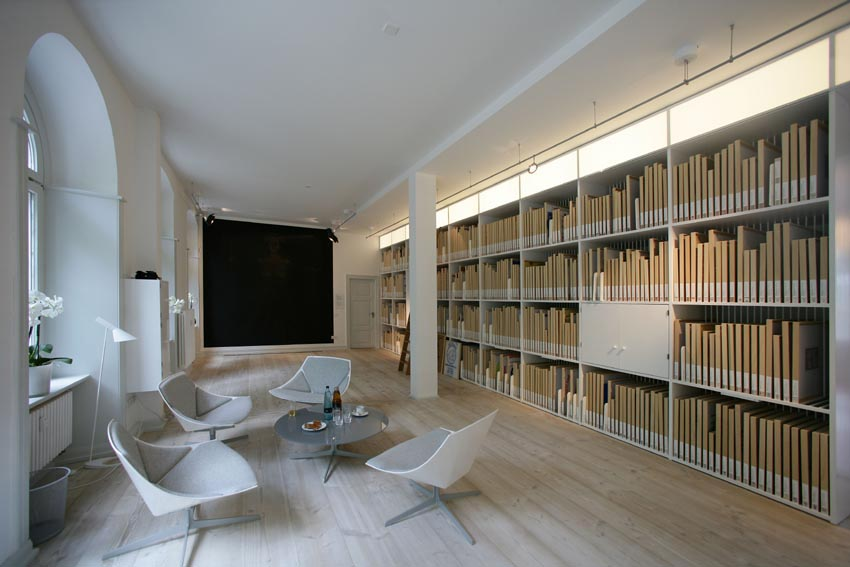 flour art museum Sackothek